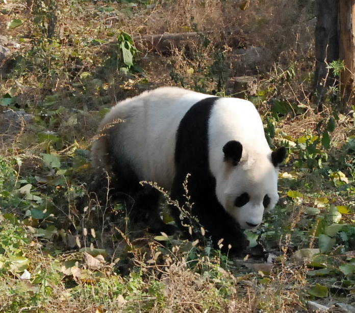 北京动物园的大熊猫